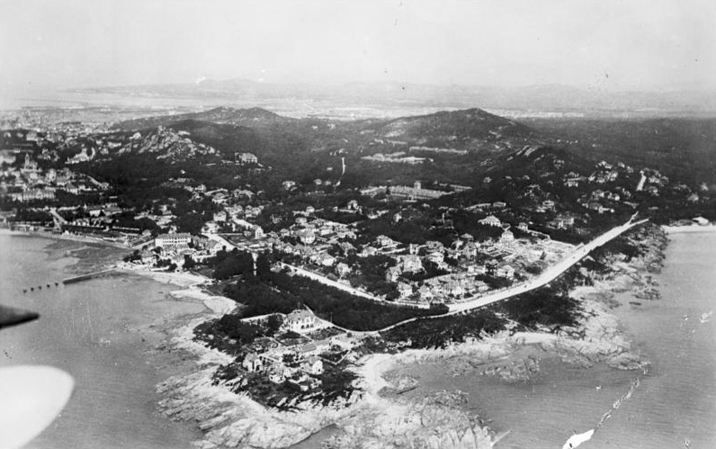 Tsingtau, Teilansicht China, Tsingtau.- Teilansicht aus dem Jahre 1930. [Im Vordergrund ehem. Offizierskasino ( jetzt Admiralität), links Reste der alten Yamenbrücke.]